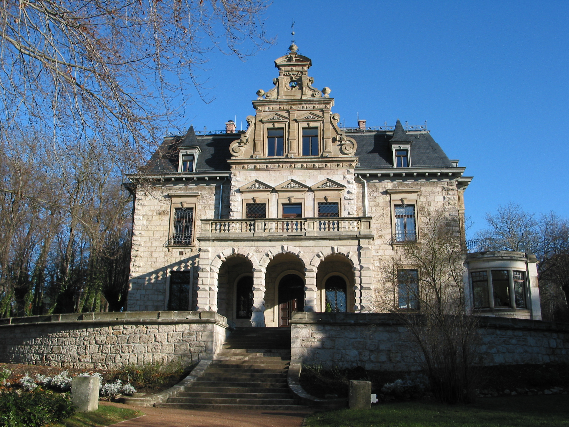 Westfassade der Villa Haar im Park an der Ilm in Weimar, Ortsteil Oberweimar, Dichterweg 2a; erbaut 1885; unter Denkmalschutz